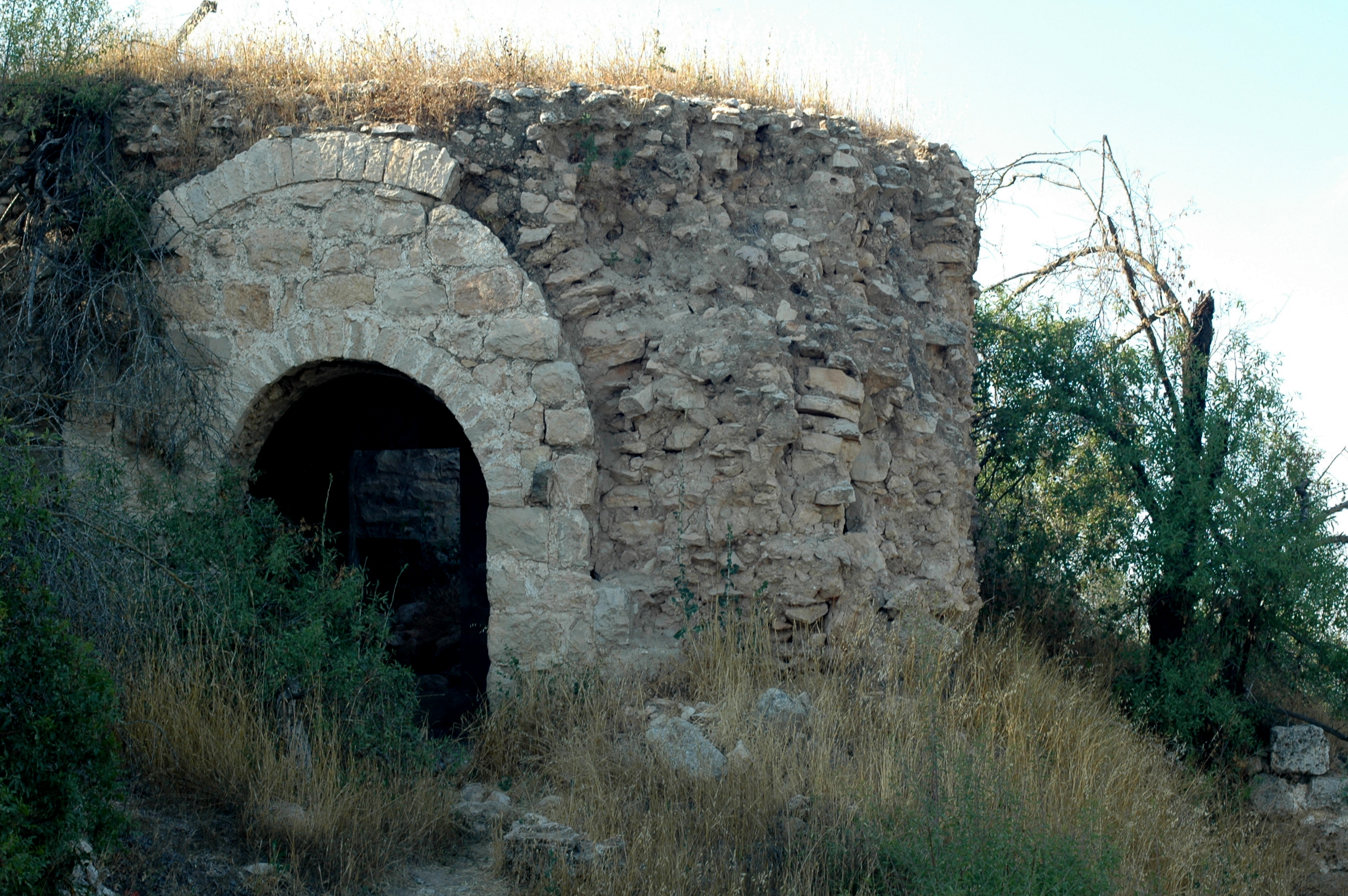 שרידי מבנה מהתקופה הצלבנית